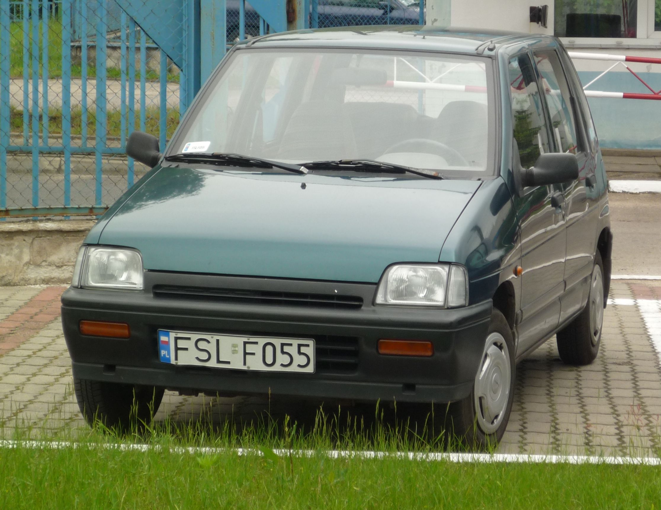 Daewoo Tico w Słubicach.